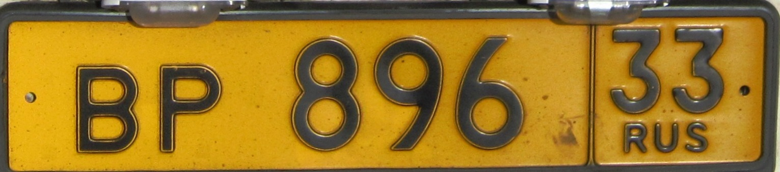 Russische kentekenplaat voor bussen